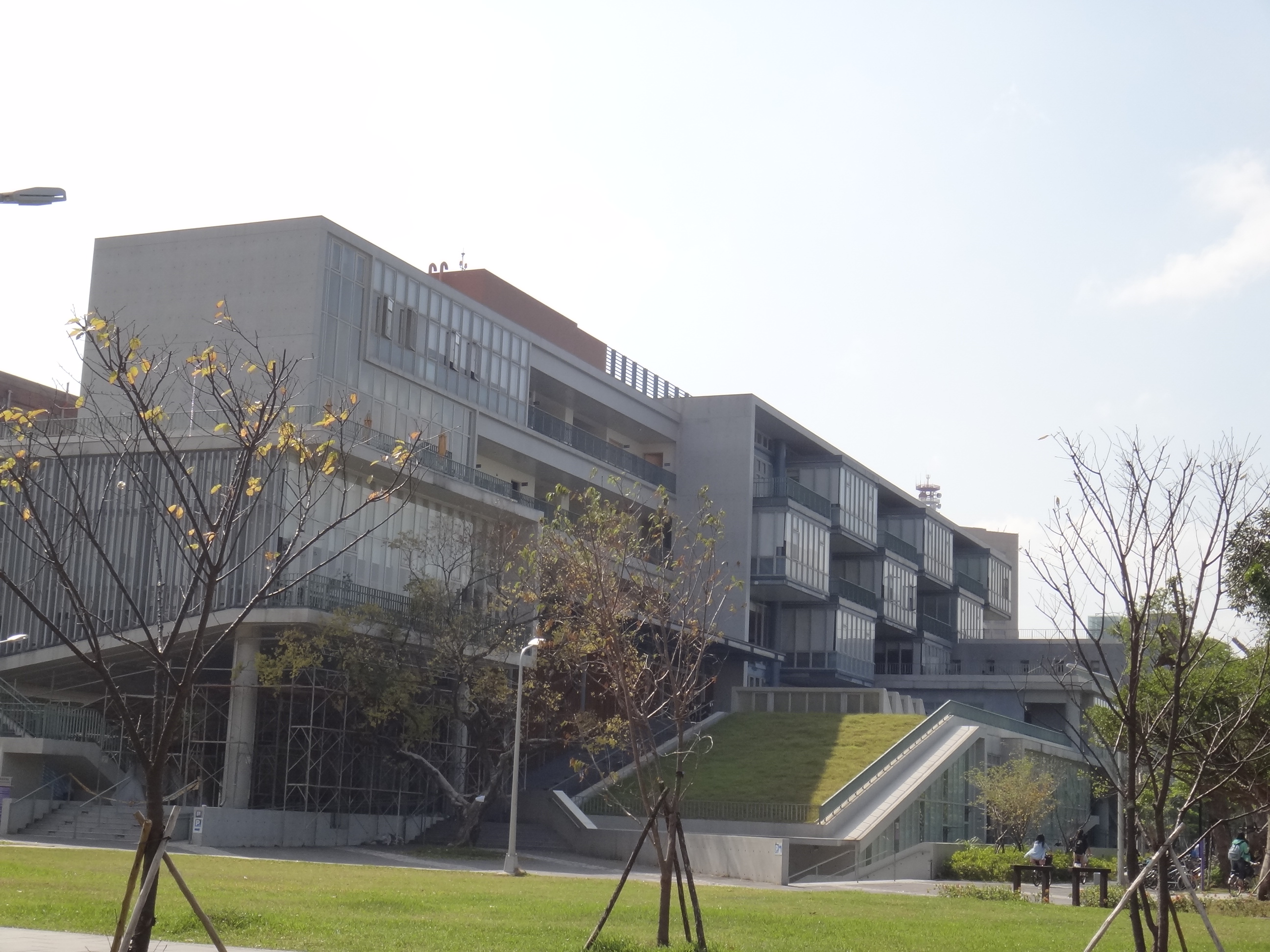 中文（台灣）: 台灣大學博雅教學館外觀